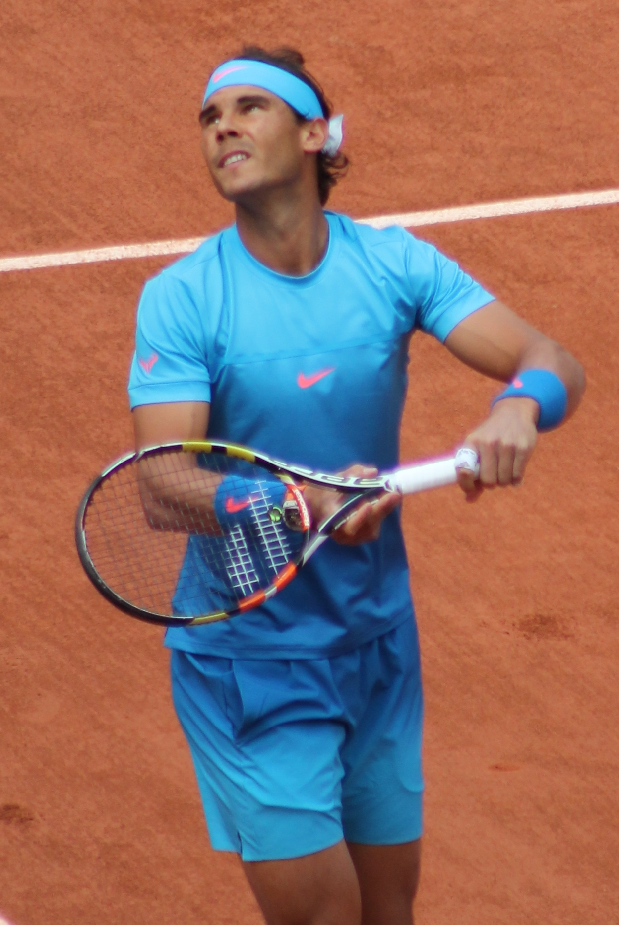 Nadal RG15 (27)